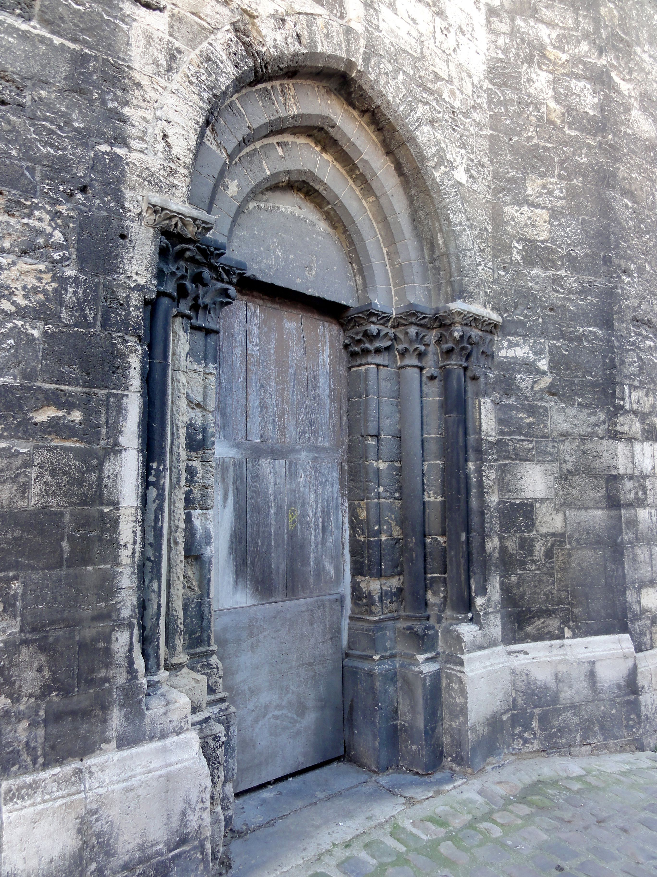 Chapelle de la Vierge, portail occidental.